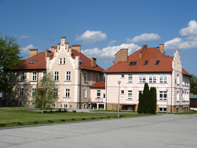 Centrum Biotechnologii PRz w Albigowej